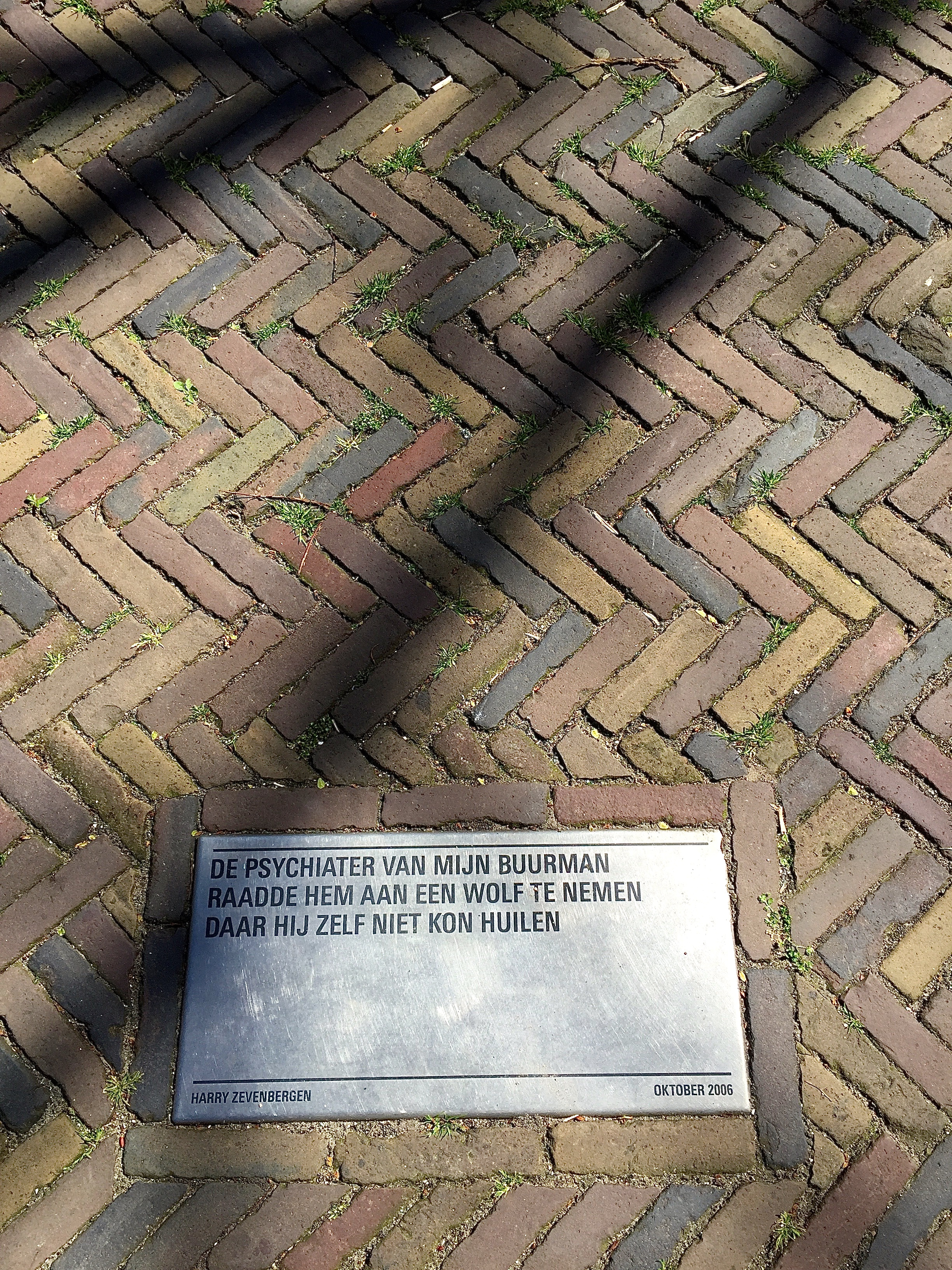 "De psychiater van mijn buurman raadde hem aan een wolf te nemen daar hij zelf niet kon huilen" (2006). Gedicht van de Nederlandse kunstenaar Harry Zevenbergen (Randwijk 1964). "Because he himself couldn't cry my neighbor's shrink advised him to get a wolf as a pet". Poem by Dutch artist Harry Zevenbergen (1964).